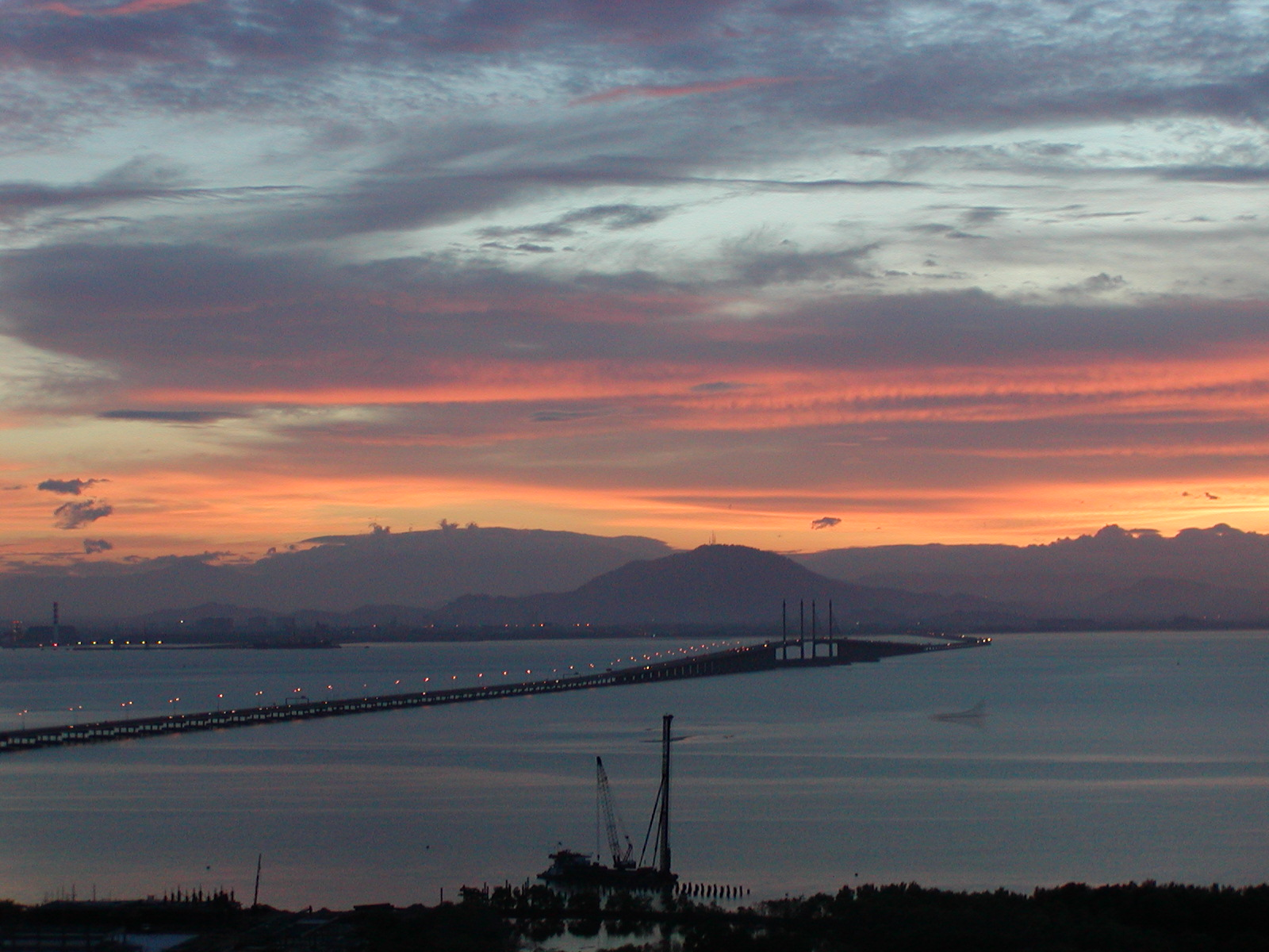 Foto der Penang-Brücke in Malaysia. Es zeigt eine Gesamtansicht der Brücke in der Abenddämmerung.